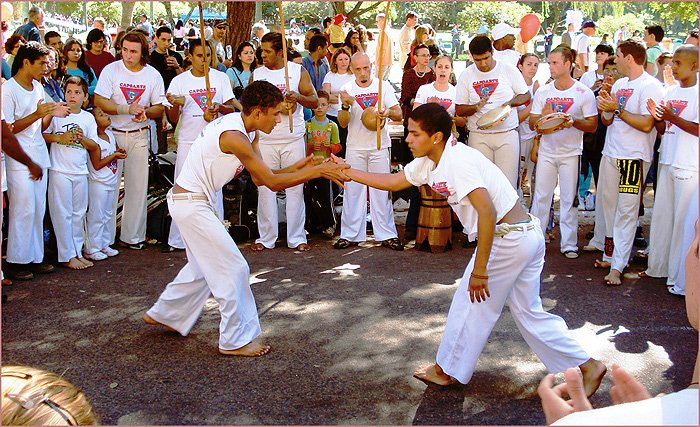 Roda de capoeira no Parque da Redenção, Porto Alegre, Brasil.